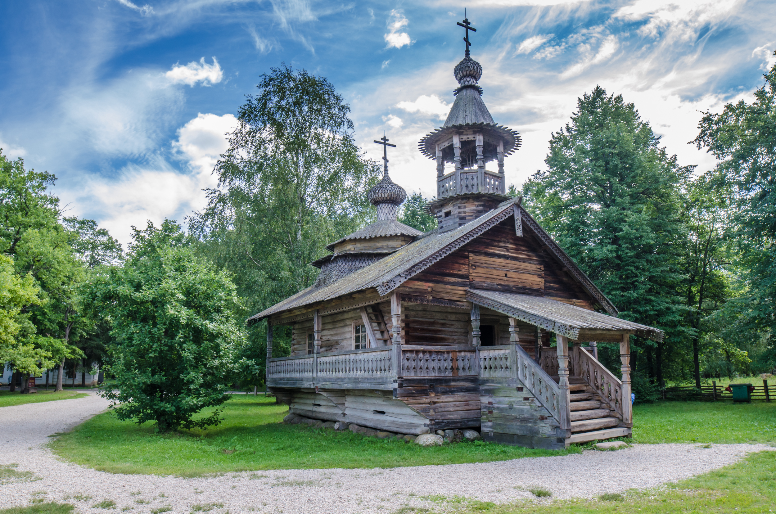 Часовня Кирика и Иулиты из д. Кашира Маловишерского района: Витославлицы, стр. 9, Великий Новгород, Новгородская область